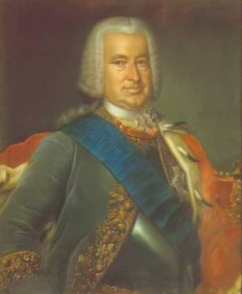 Ritratto di Ernst Johann von Biron, Duca di Curlandia Портрет работы Л.Шорера 1760-е годы. Рундальский дворец. Латвия. Единственный портрет герцога после возвращения из ссылки.